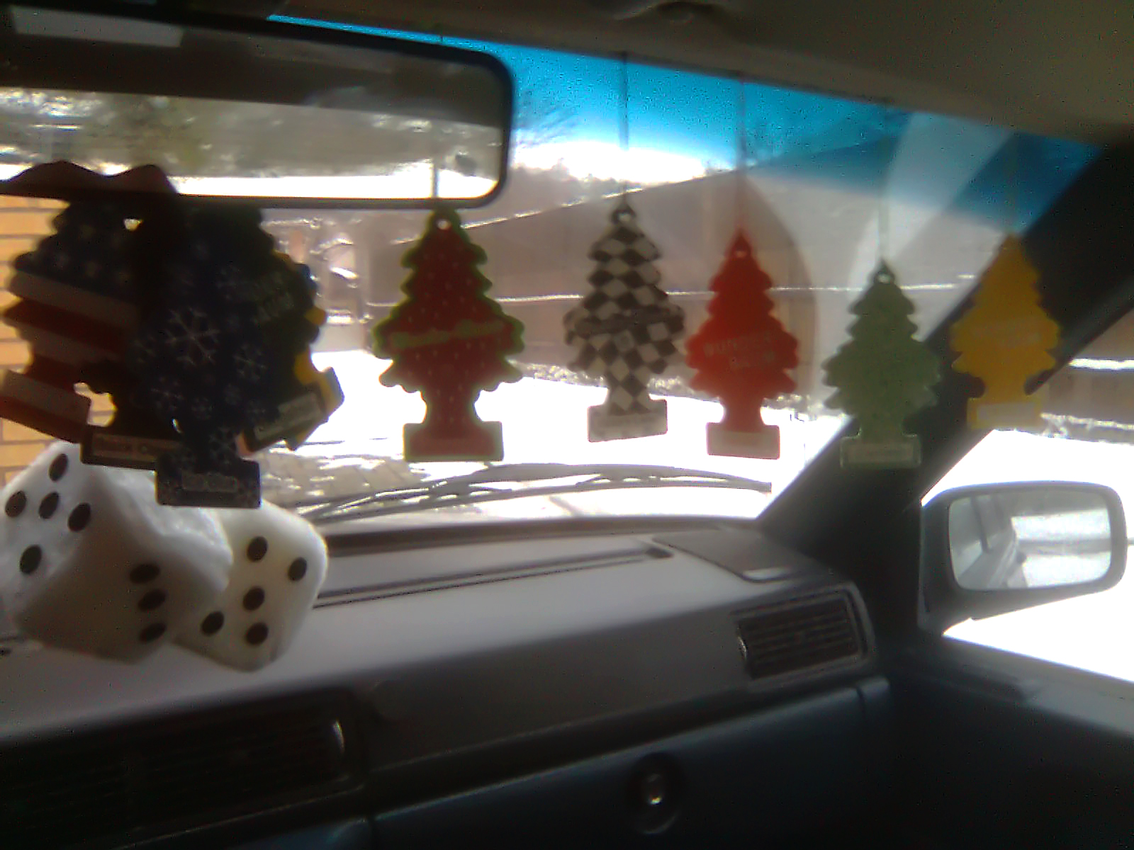 Några wunder-baums